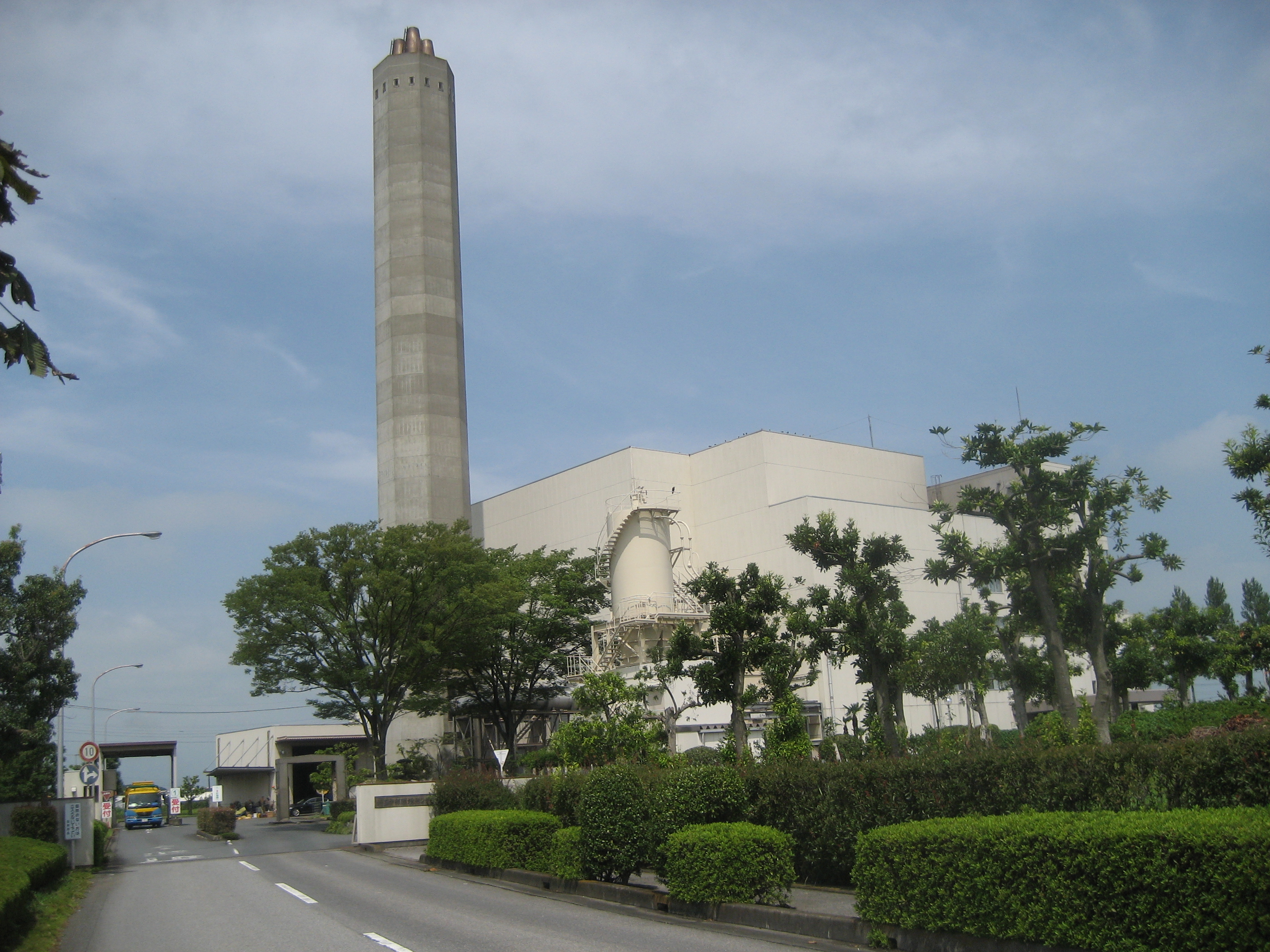 埼玉県吉見町にある埼玉中部環境保全組合の埼玉中部環境センター